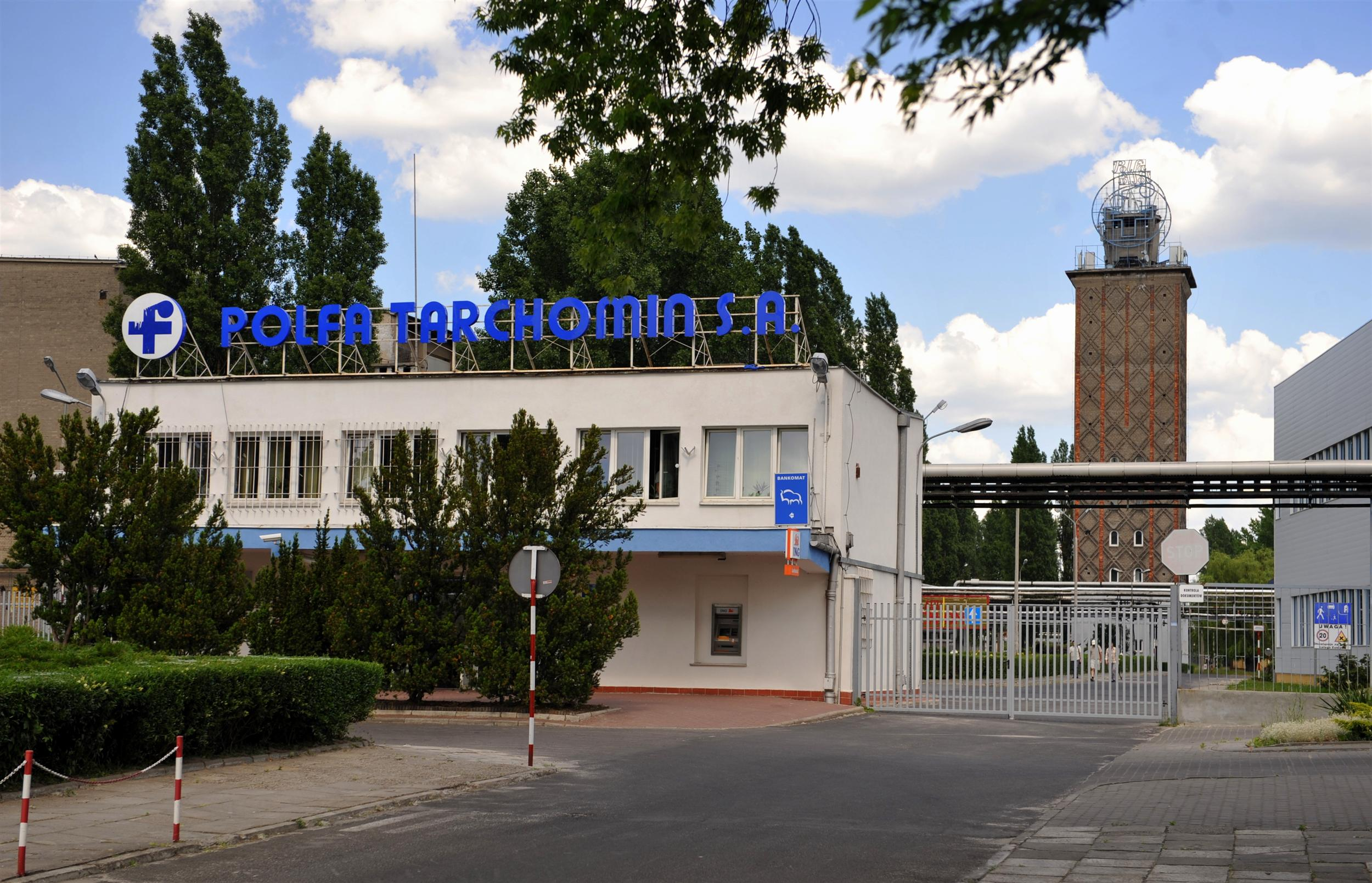 Brama główna do zakładów farmaceutycznych Polfa Tarchomin